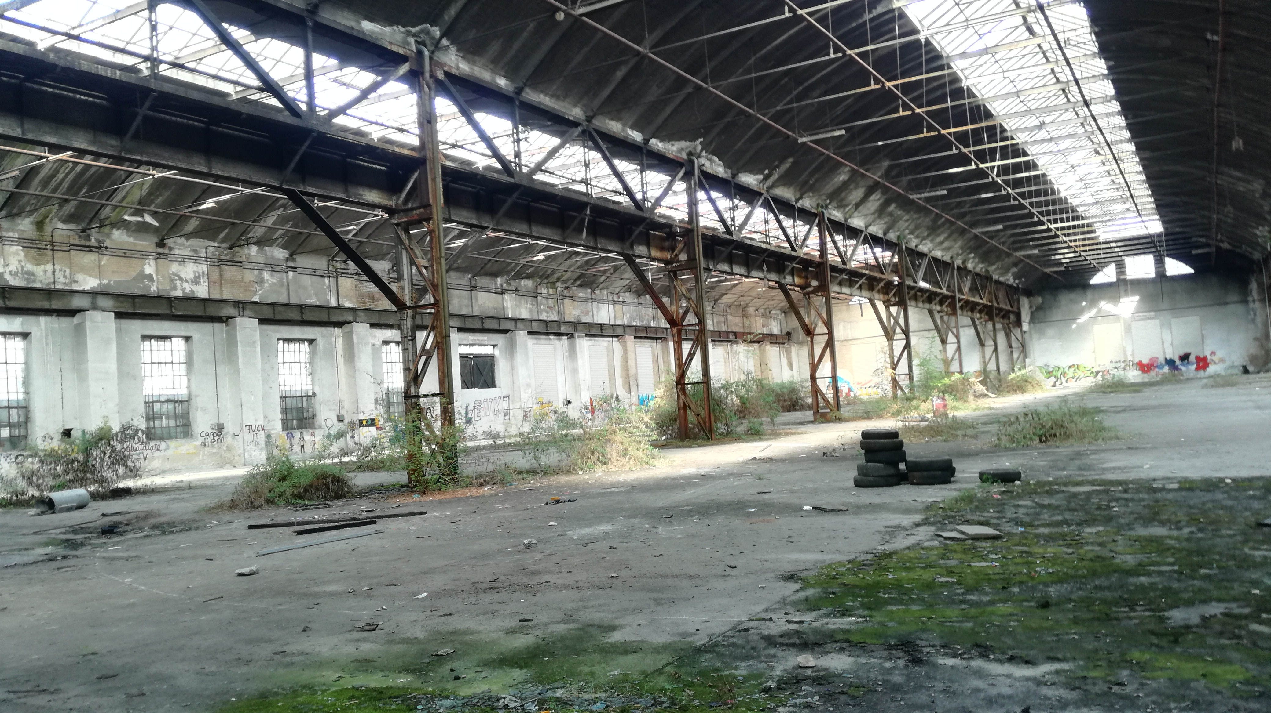 Die Wagenrichthalle II auf dem Gelände des ehemaligen Ausbesserungswerkes Schwetzingen von Innen April 2017